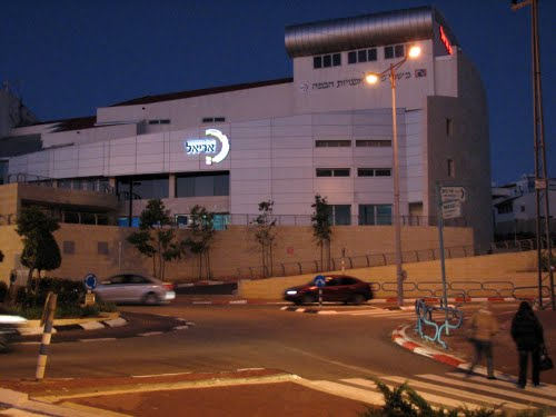 משכן האומנות אריאל